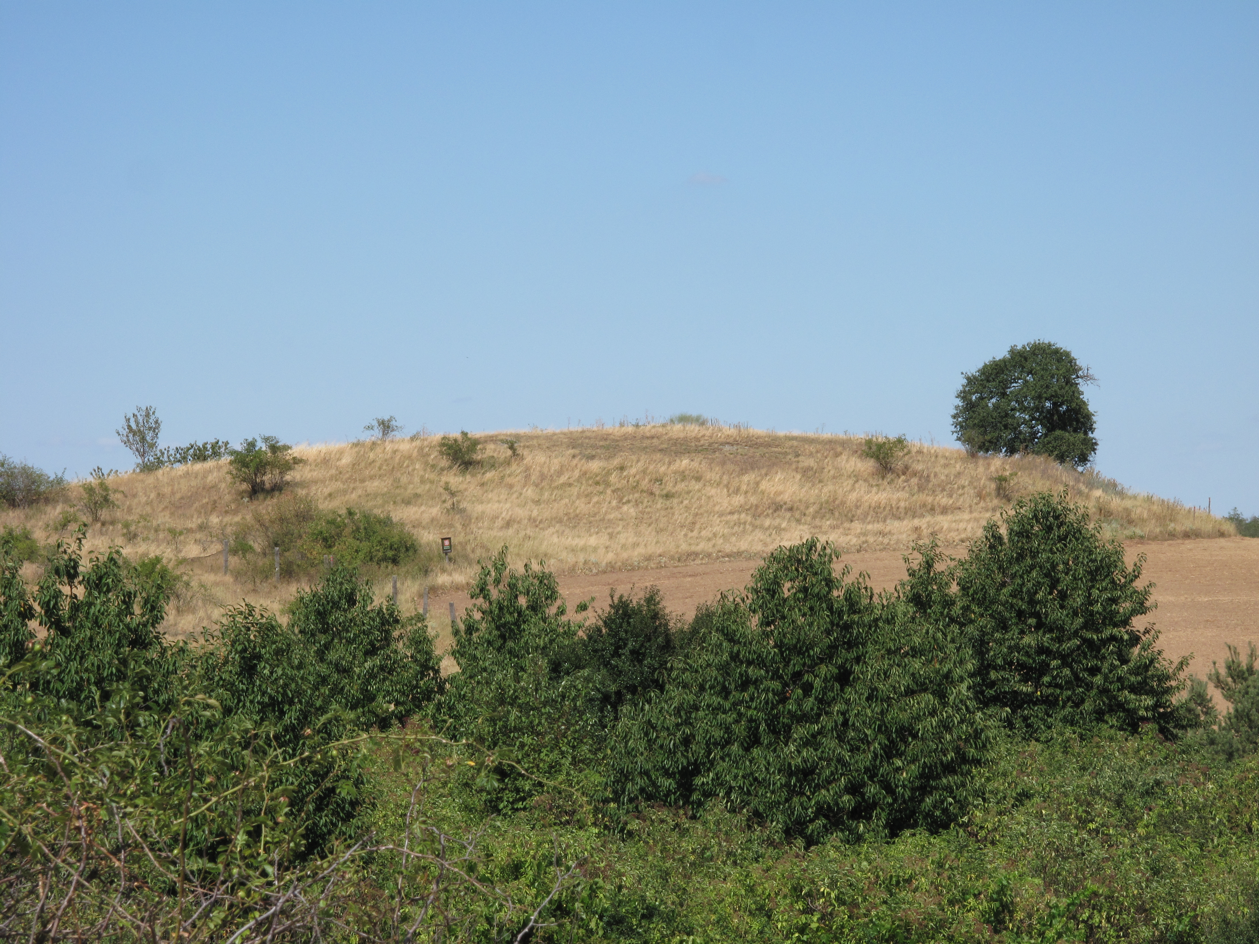 Přírodní rezervace Na Kocourkách. Okres Znojmo, Česká republika.